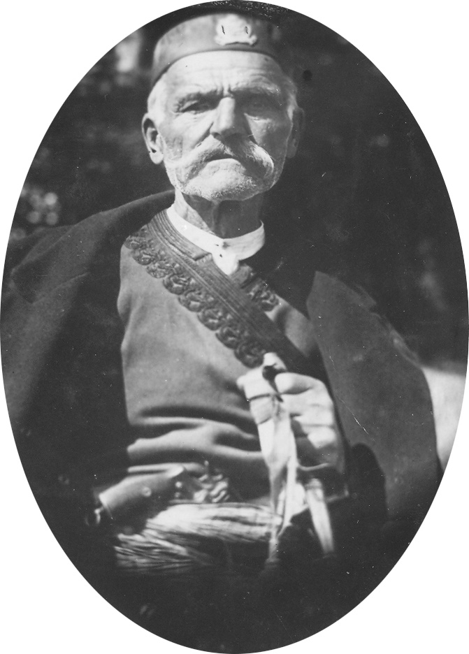 Srpski (latinica): Perisa Radonjin Tomovic(djed Slobodana Tomovica)Oficir crnogorske narodna vojske